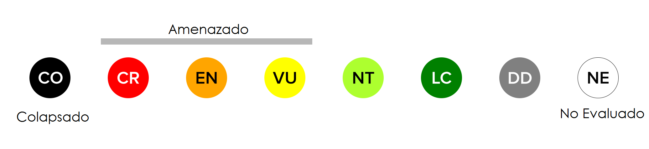 Colores del estado de conservación, según la clasificación otorgada por la actual versión de la Lista Roja de Ecosistemas elaborada por la UICN. Categorías otorgadas por la actual versión de la Lista Roja de Ecosistemas elaborada por la UICN.